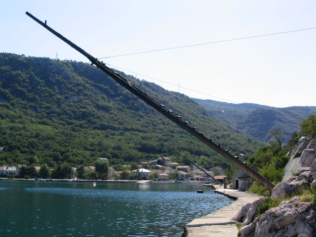 Tunere